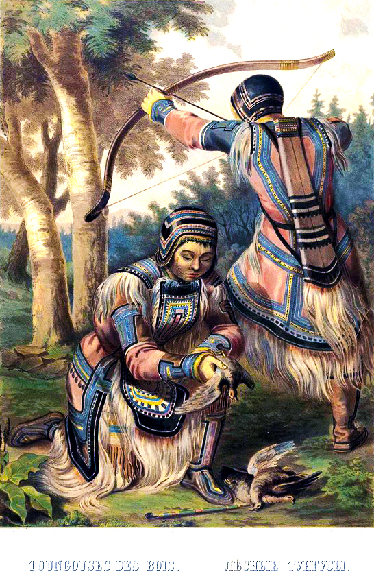 Лесные тунгусы. Этнографическое описание народов России Густава-Федора Христиановича Паули